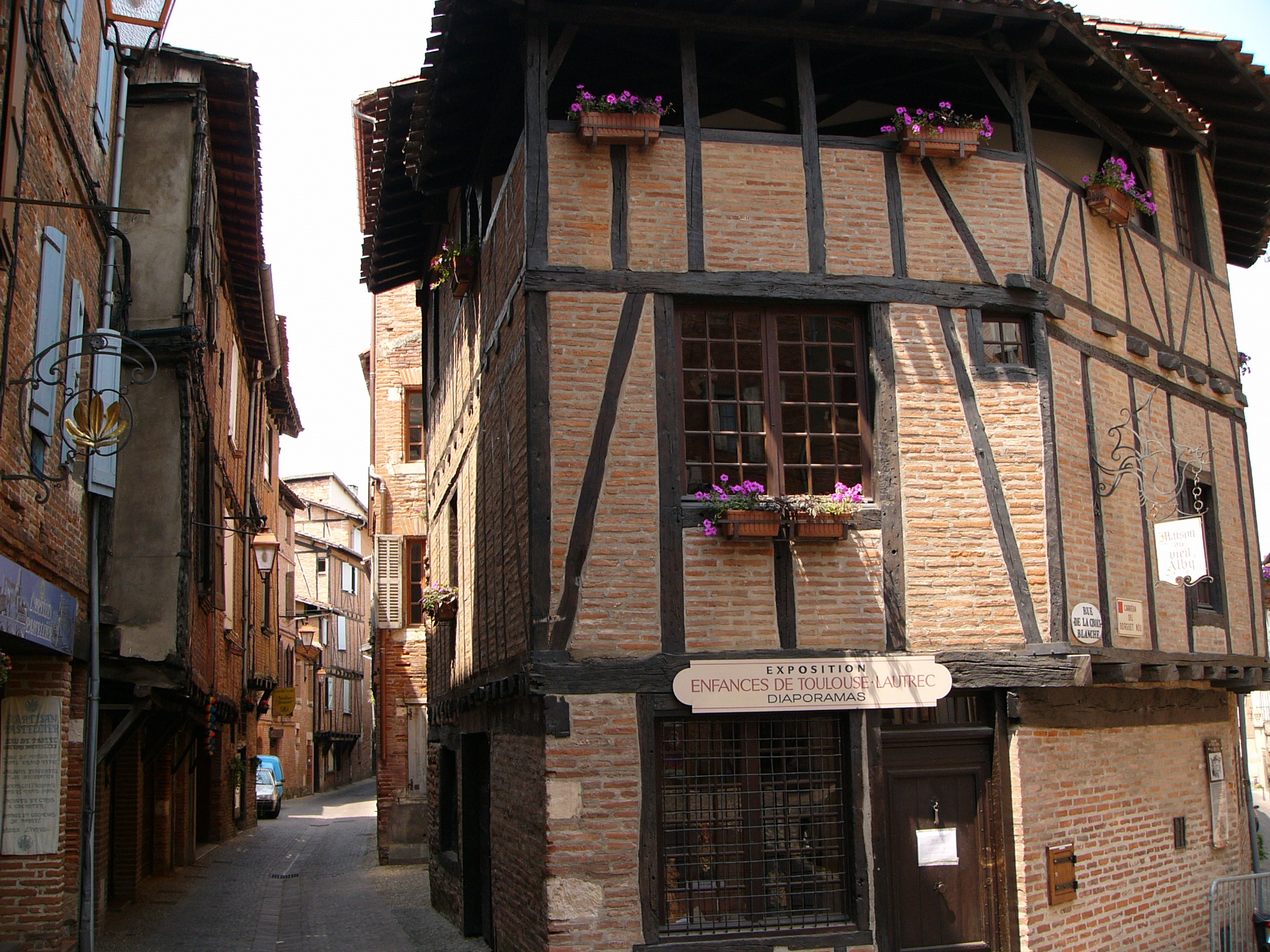 Straat in Albi